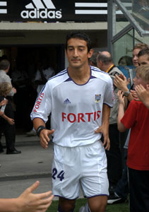 Serhat Aikin.